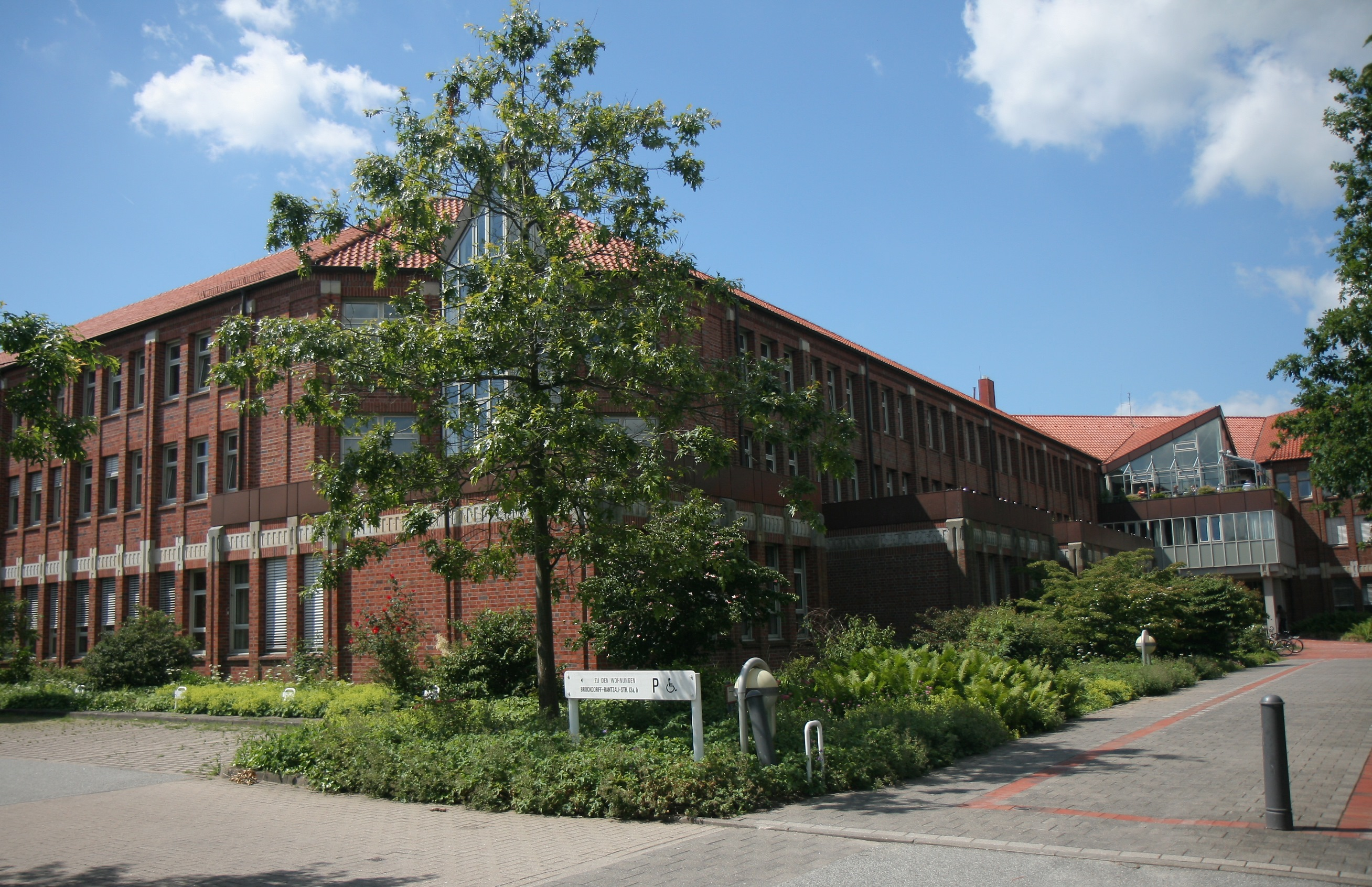 Schleswig-Holsteinisches Landesverfassungsgericht, Schleswig-Holsteinisches Oberverwaltungsgericht, Schleswig-Holsteinisches Verwaltungsgericht und Sozialgericht Schleswig in Schleswig, Brockdorff-Rantzaustraße 13.